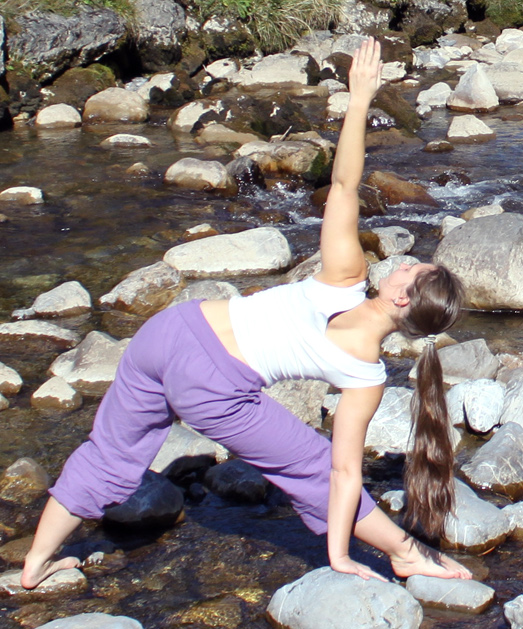 Denise Weiner from Darmstadt in Yoga Pose (Utthita-) Trikonasana over Giessbach (Giessbachtal, near Axalp/Lake Brienz, Switzerland)